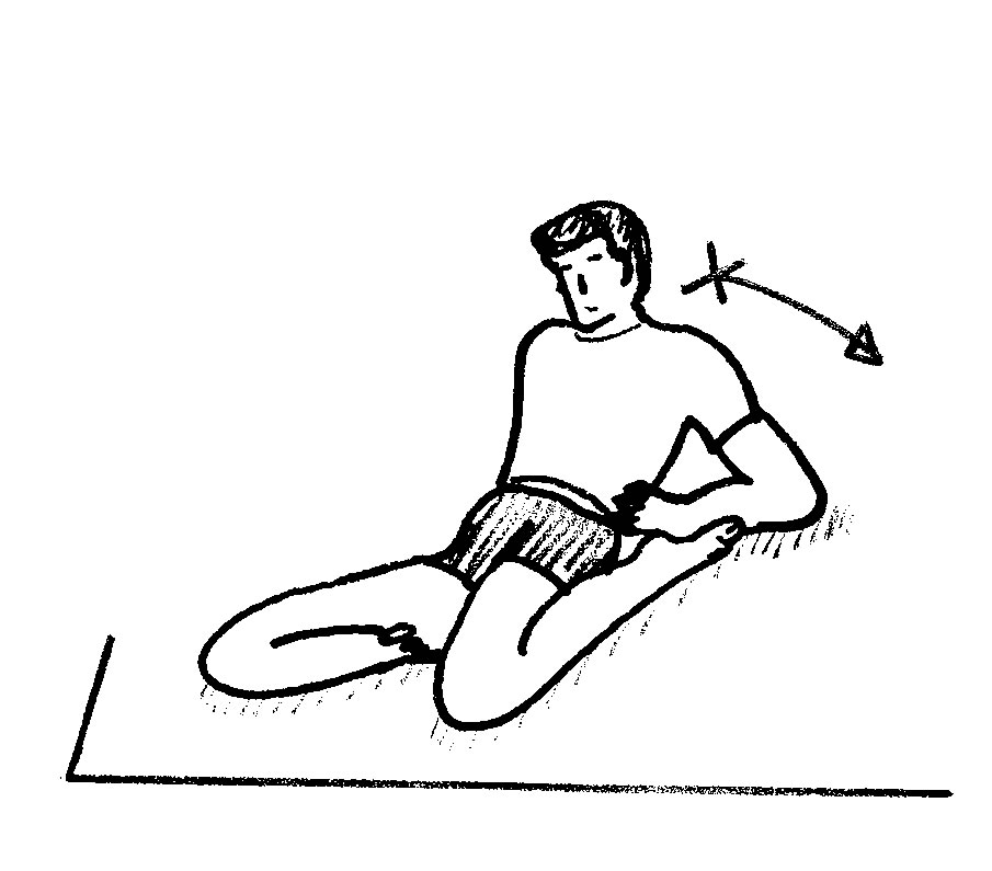 bando_yoga0.jpg